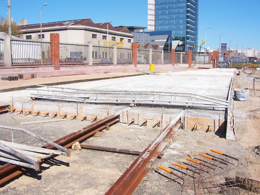 Hormigón terminado, aproximadamente a las cinco horas de puesto en obra.